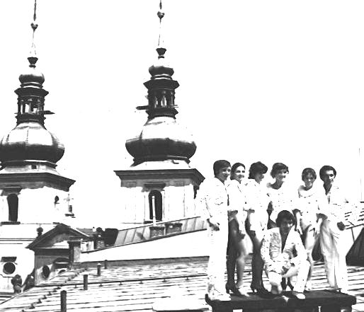 Fotografie skupiny 7 Kaiser po vystoupení na Havelském kostele